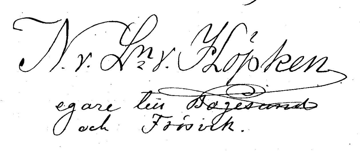 Nils Albrekt Stefan von Lantingshausen von Höpken signatur på en fullmakt